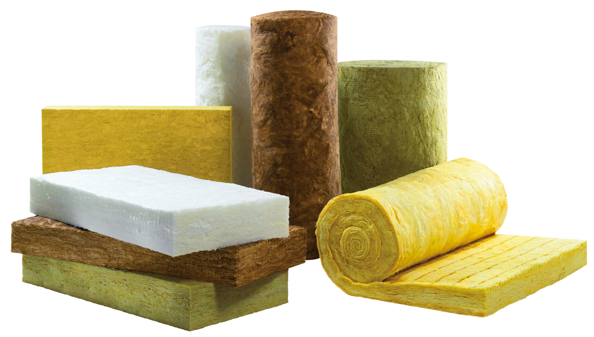 Verschiedene Produkte aus Mineralwolle, als Matte und als Rolle.